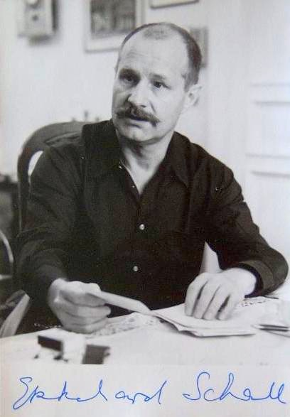 Bildbeschreibung: Autogrammkarte Ekkehard Schall, 1989 Fotograf/photographer: photo taken by User:SpreeTom Die Autogrammkarte befindet sich in Eigenbesitz. date/Datum: 11.03.2006